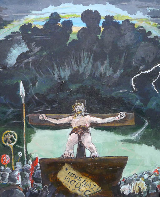 Golgotha - 2013 - olieverf op linnen - 80x60 cm - Bouke Bonifacius Jagt, Padang 19420505